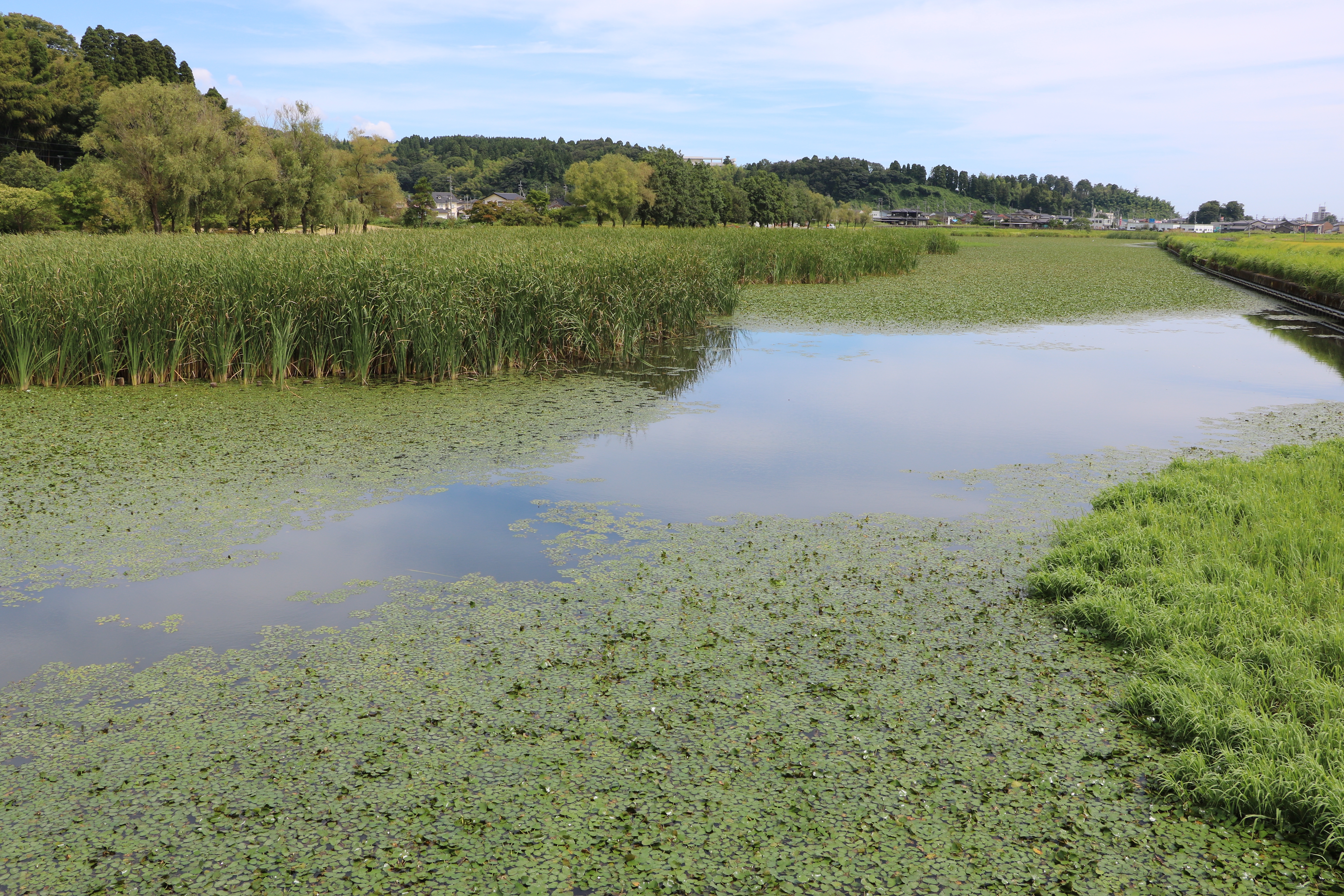 十二町潟（富山県氷見市）